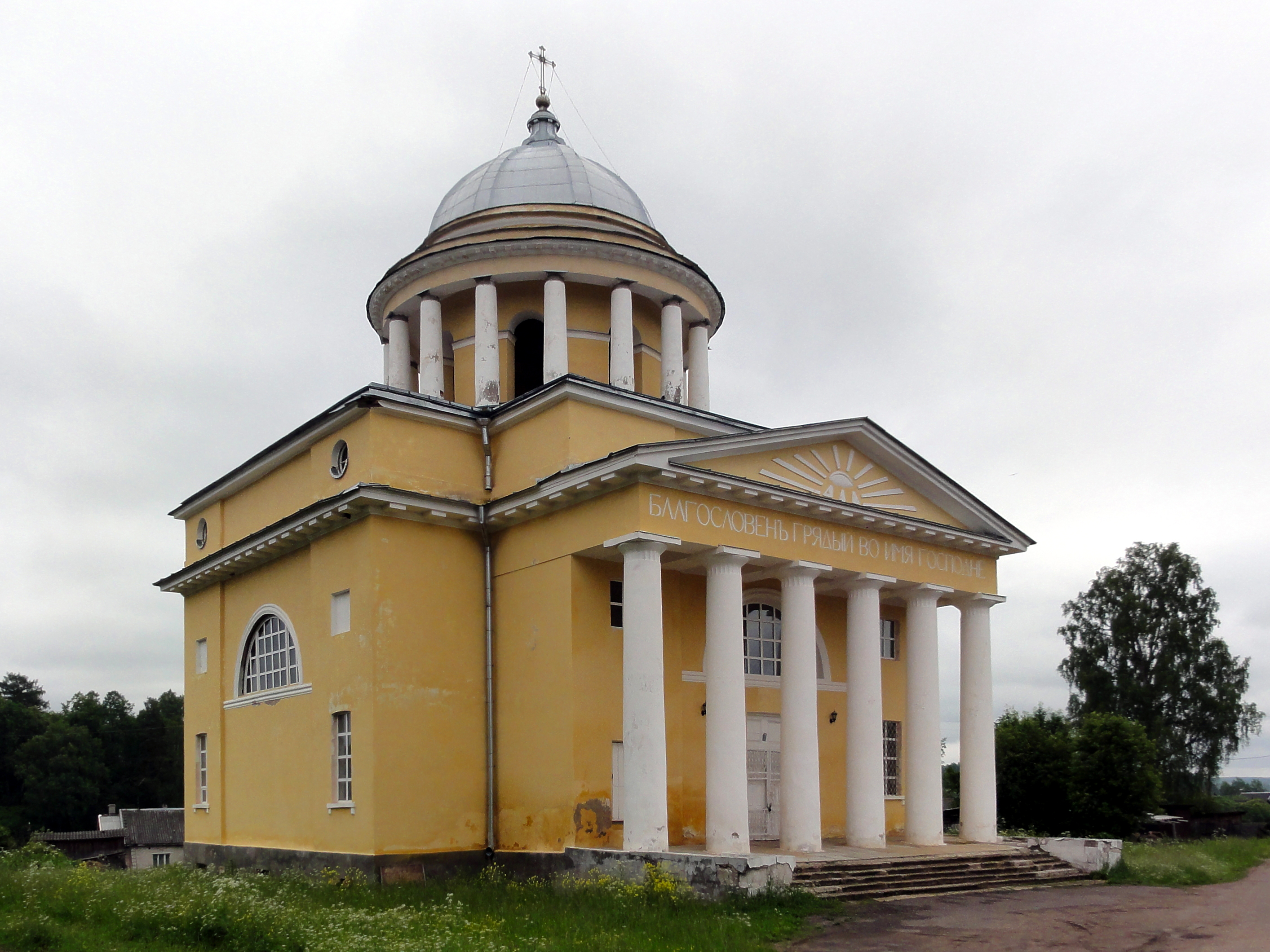 "Северный маршрут" из СПб в Новгородскую обл. (через Тихвин). Любытино, восстановленный храм